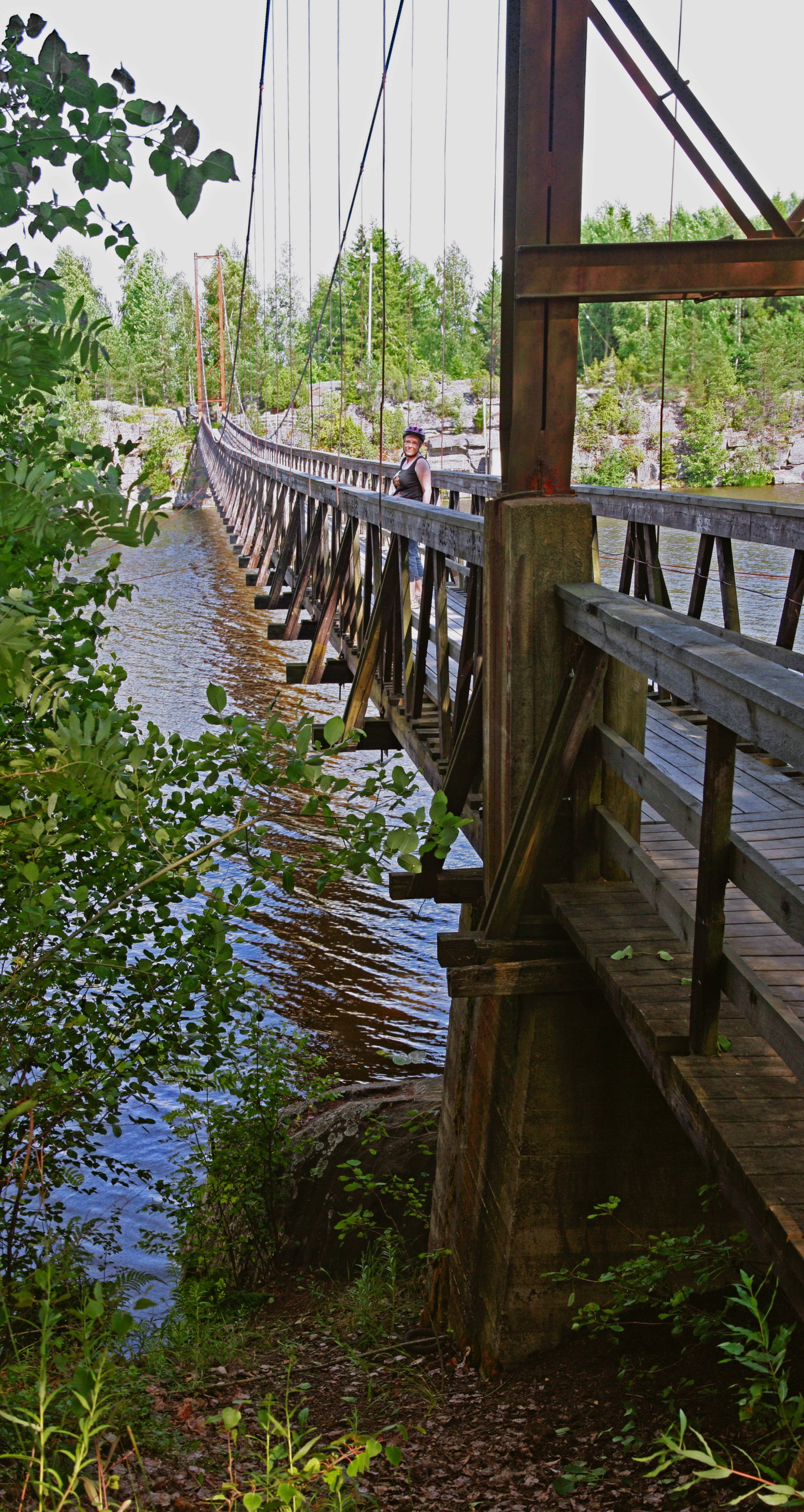 Kokemäen joki, Säpilän riippusilta